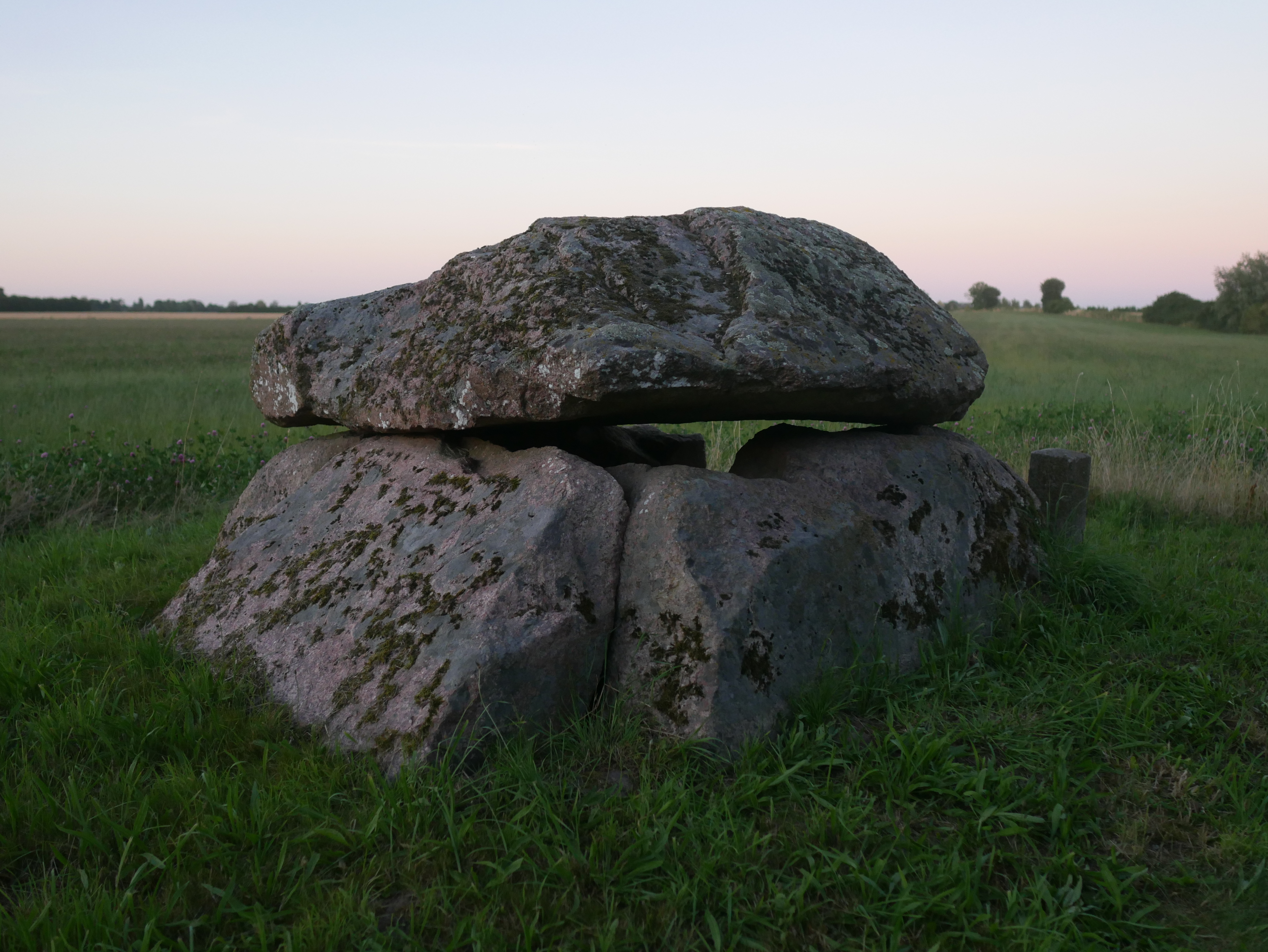 Megalithgrab von Stensby von SW